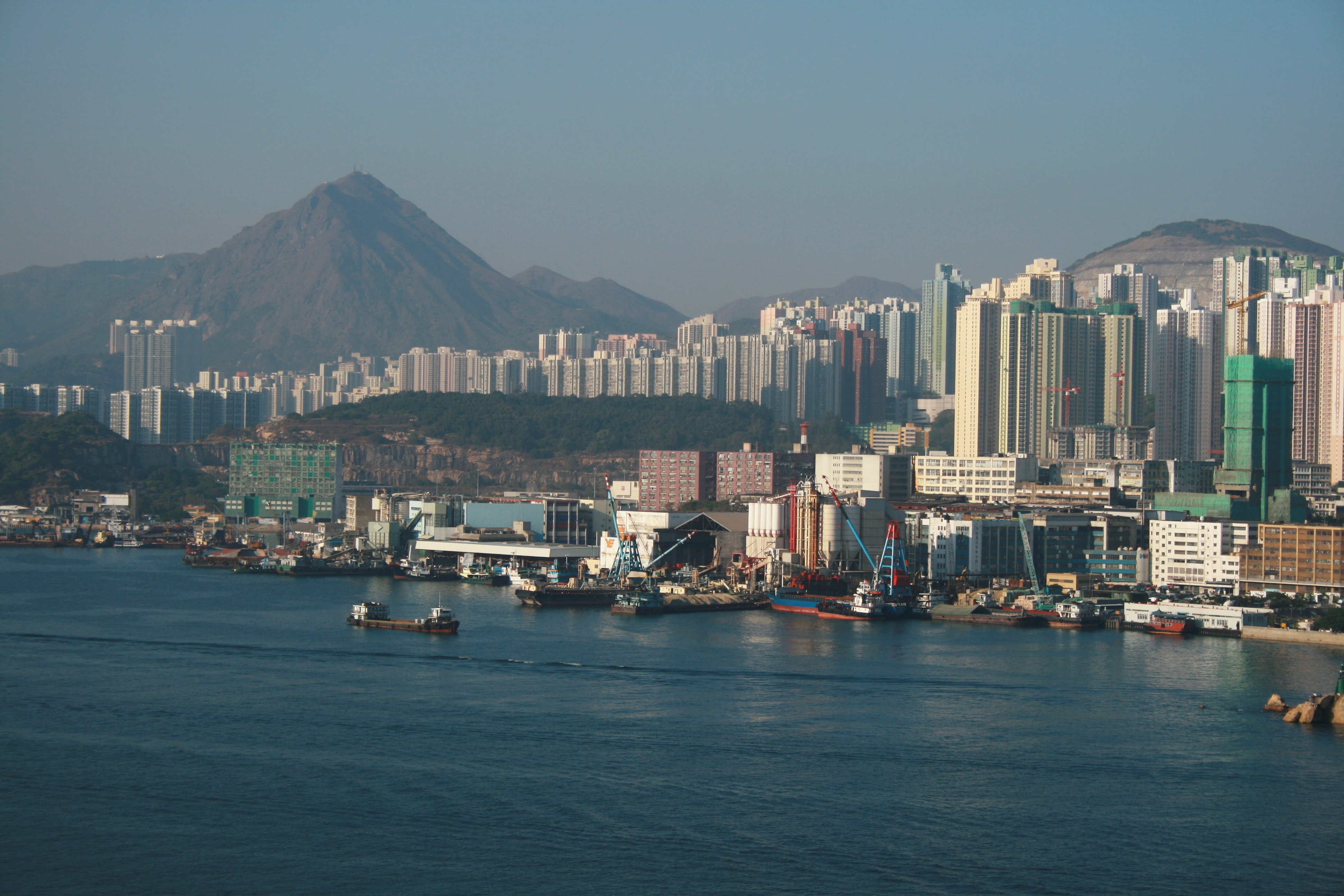 Yau Tong 油塘